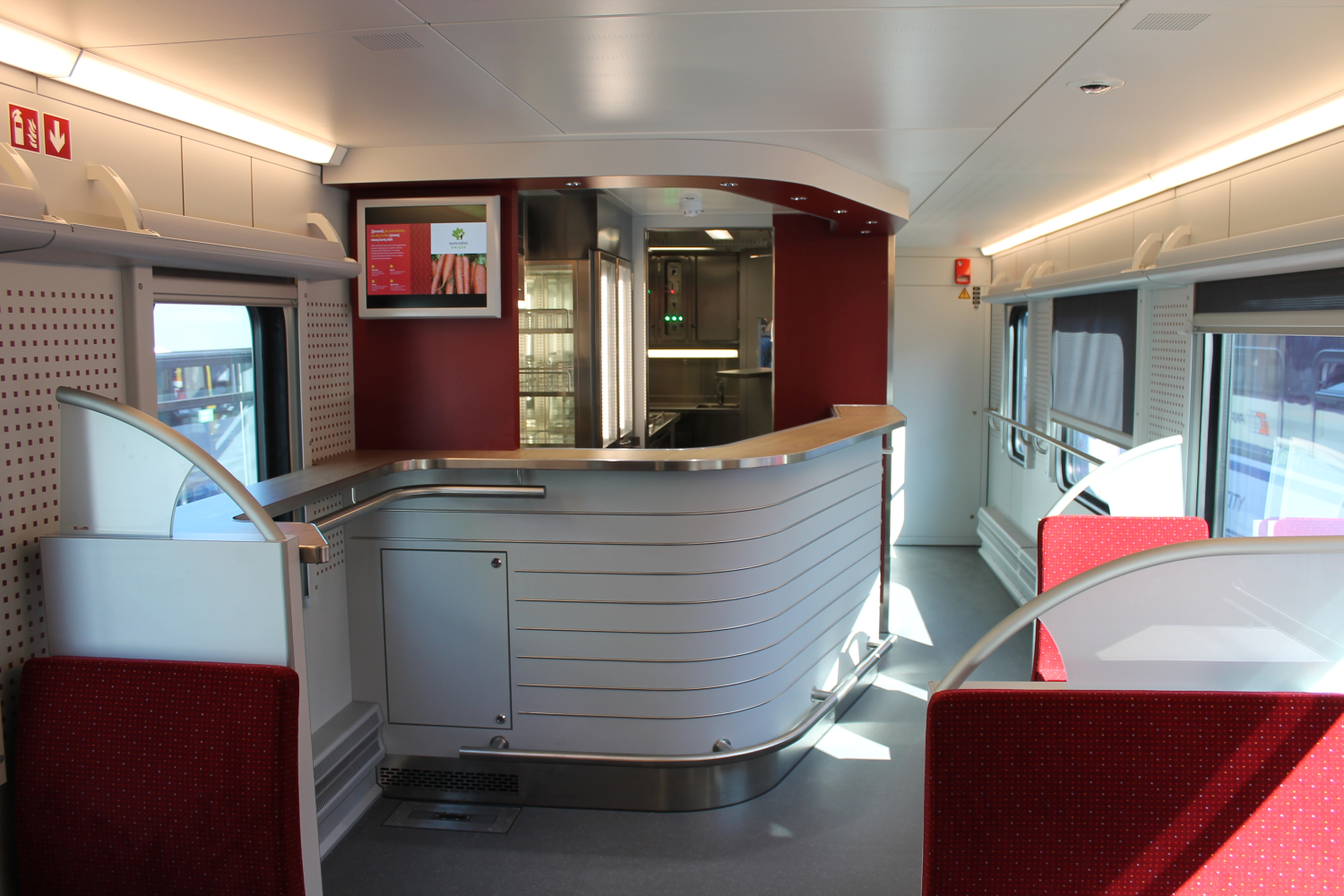 Przedział barowy w elektrycznym zespole trakcyjnym Stadler FLIRT3 ED160-009 podczas targów Trako 2015. The making of this document was supported by Wikimedia Polska Association, within Wikigrant no. WG 2015-34.